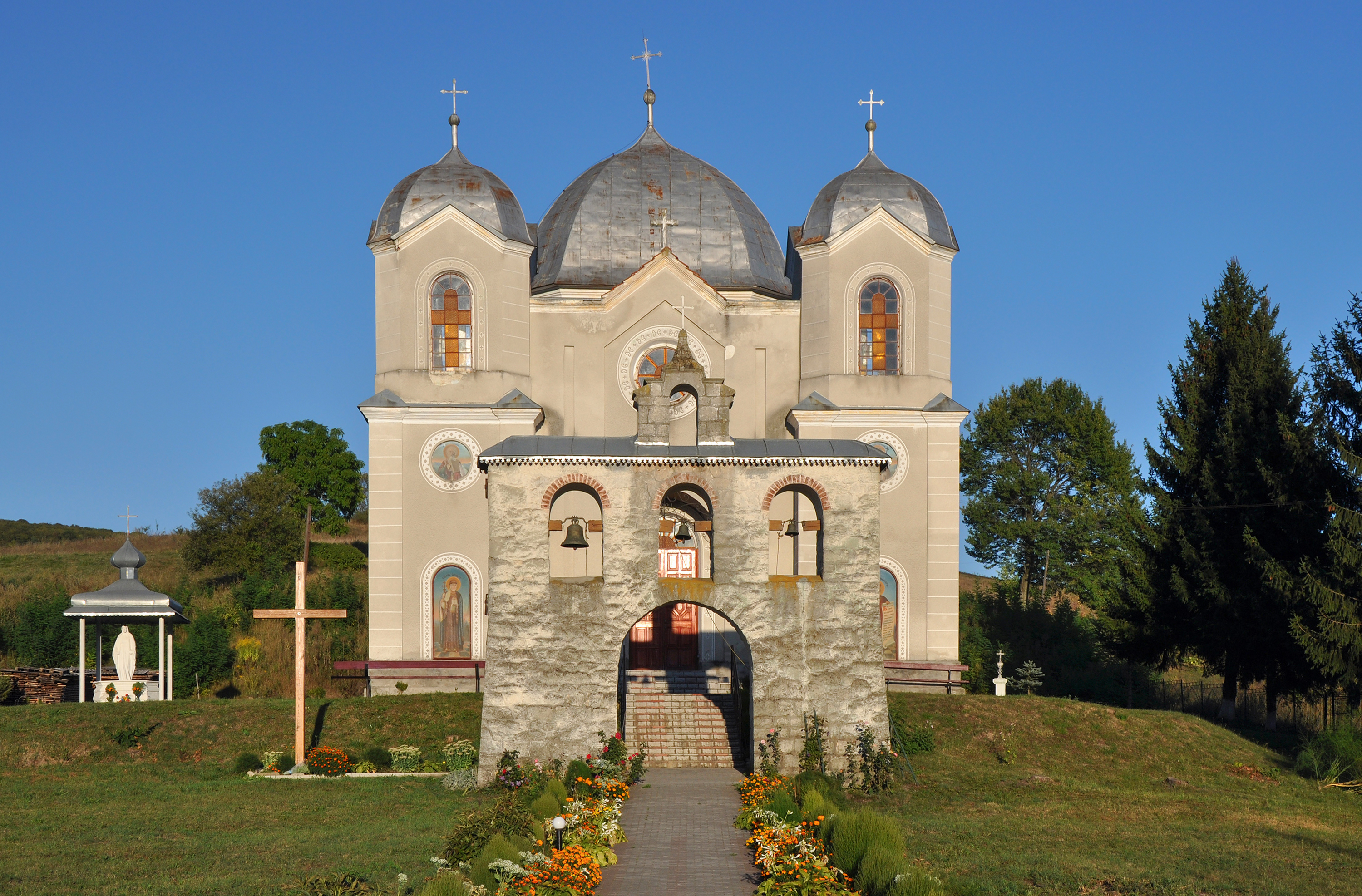 Церква мощів св. Параскеви (мур.), село Куряни